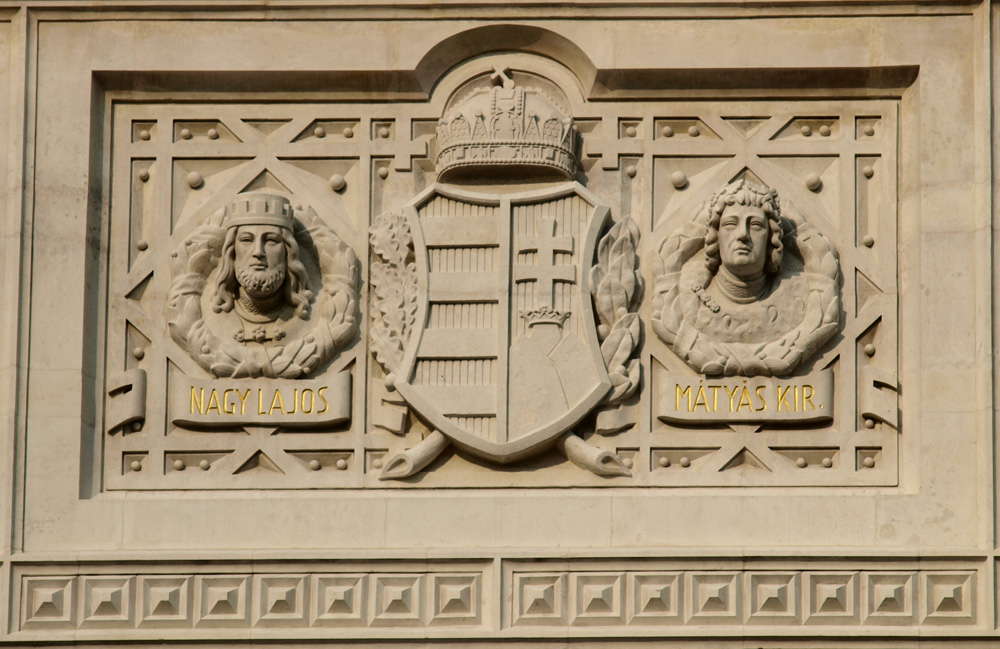 Pesti Vigadó, címer az épület homlokzatán, Budapest, V.ker., pesti Dunapart